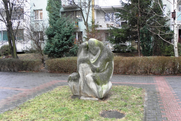 autor: Ryszard Stryjecki - polski artysta, rzeźbiarz